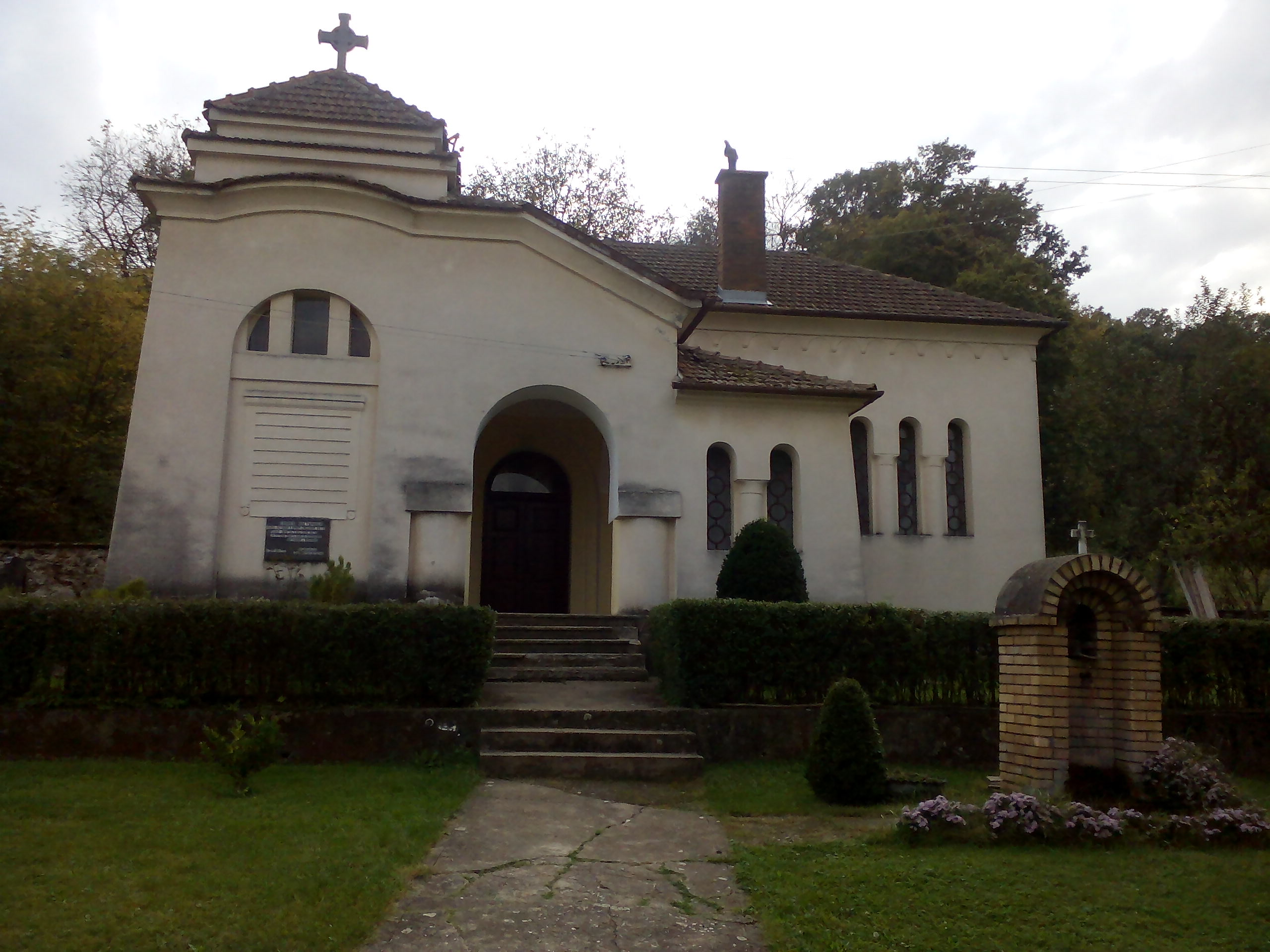 Изглед предњег дела спомен костурнице у порти багрданске цркве са чесмом испред костурнице.Аутор Иван Миловановић.